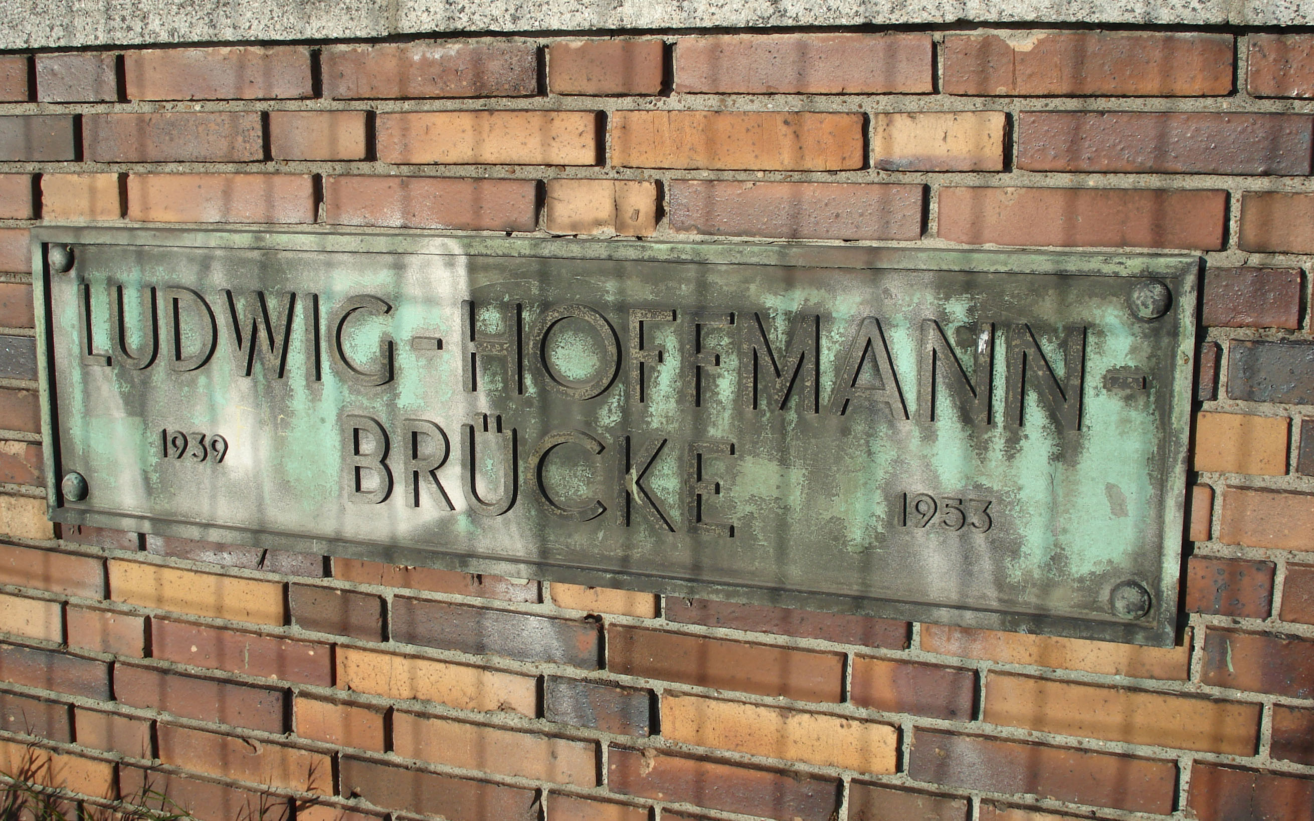 Sign on the Ludwig-Hoffmann-Brücke in Berlin